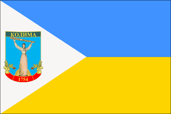 Прапор Кодими